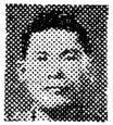 김성은 국방장관